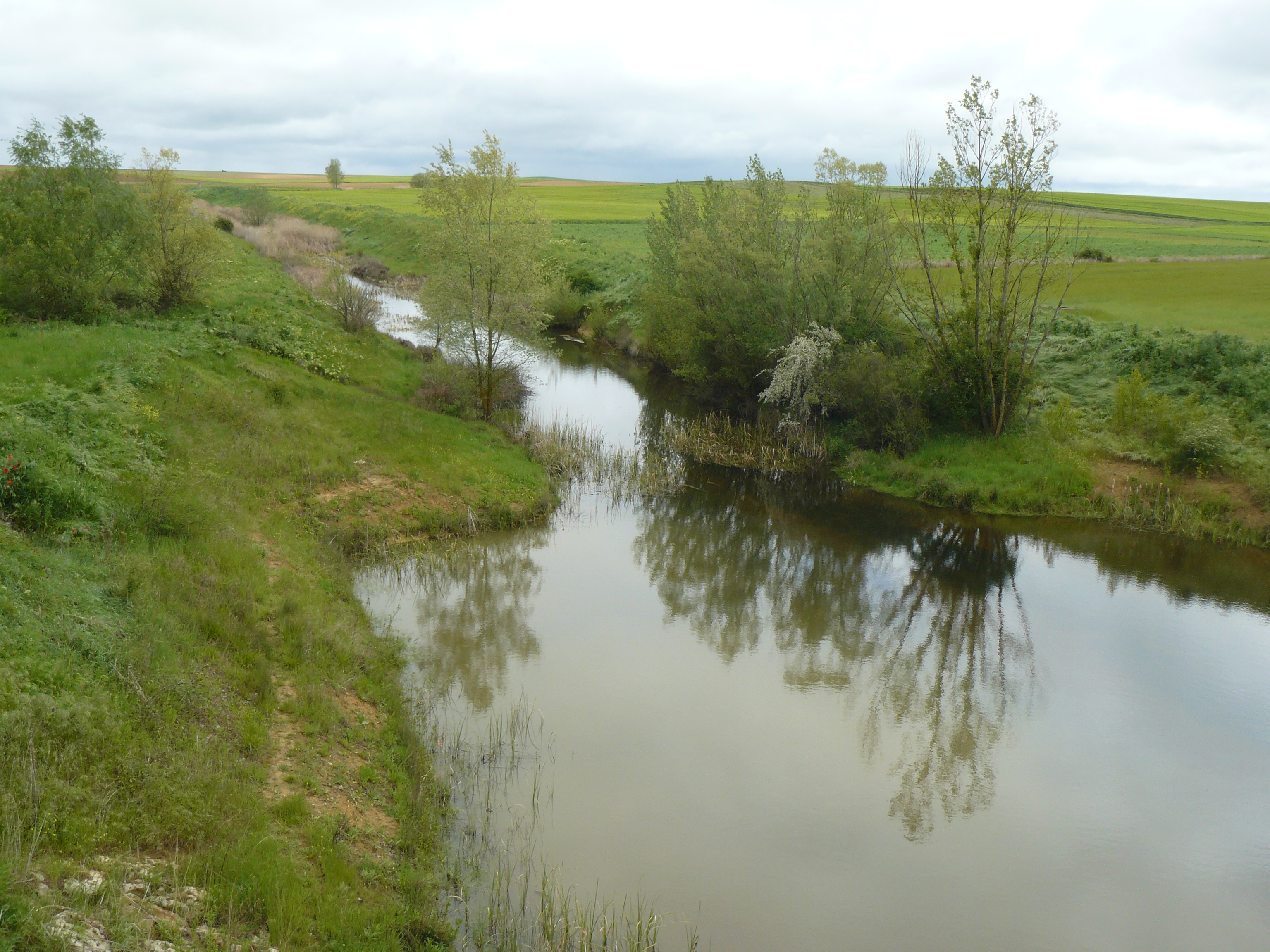 Río Sequillo a la altura de su cruce con el canal de Castilla.